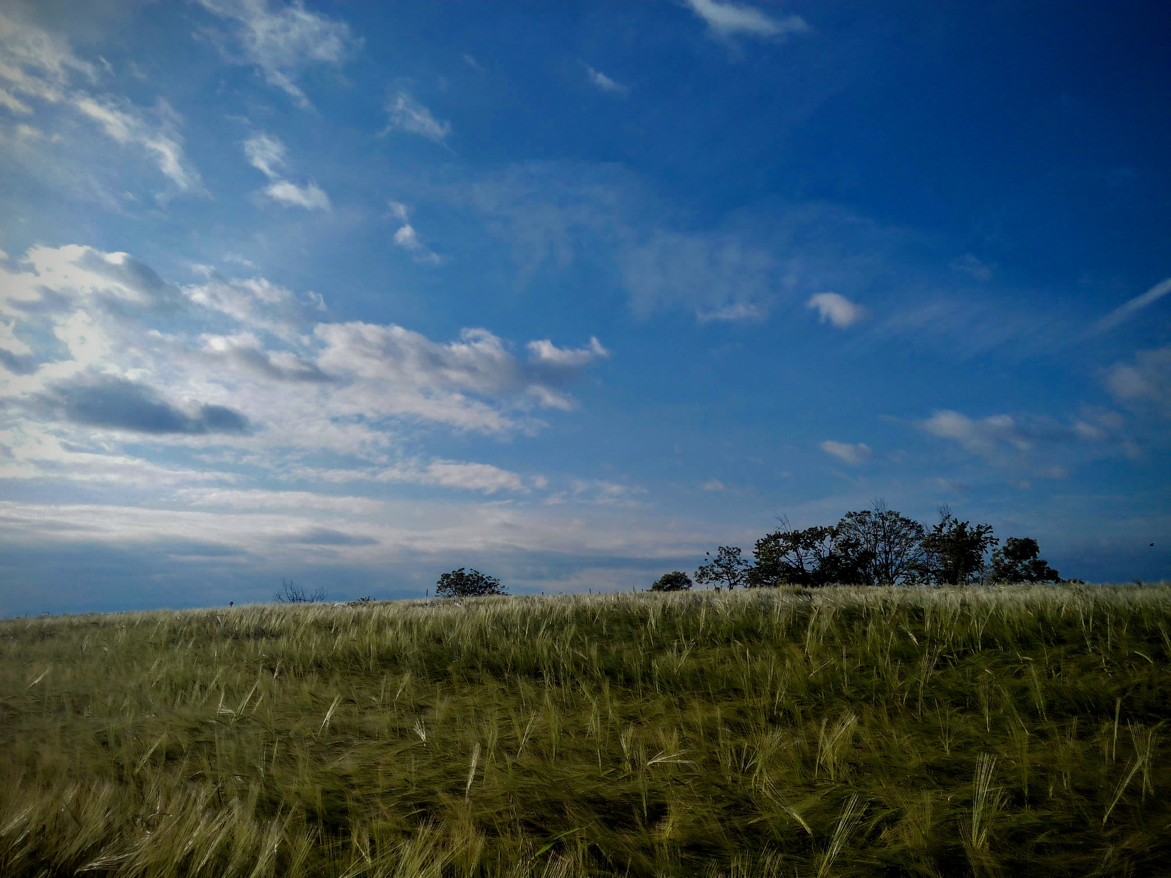 Parco Colline Moreniche di Castiglione (Q30888821)